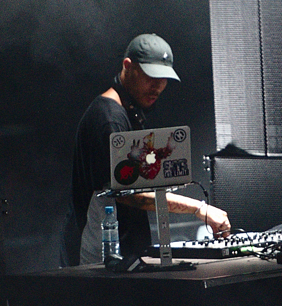 Der britische Musikproduzent TroyBoi beim splash! Festival 20 (2017).